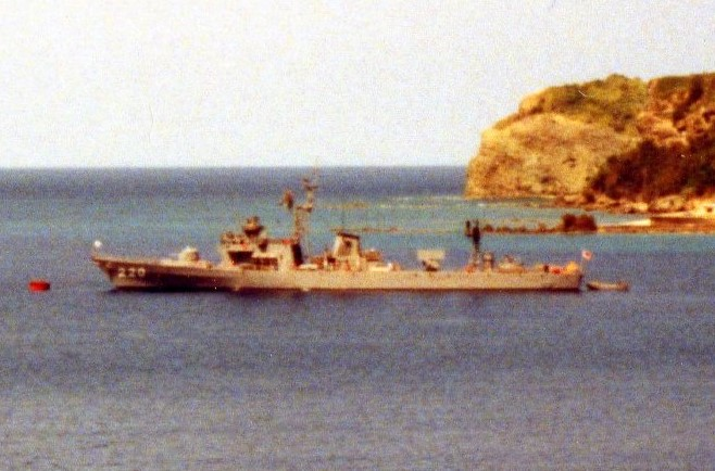 父島・二見港に停泊中の護衛艦ちとせ。